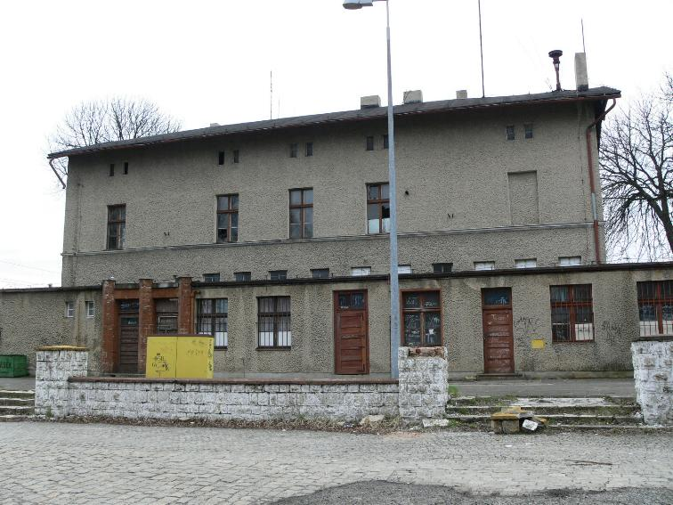 Fosowskie wejście na dworzec PKP, Bahnhof in Vossowska